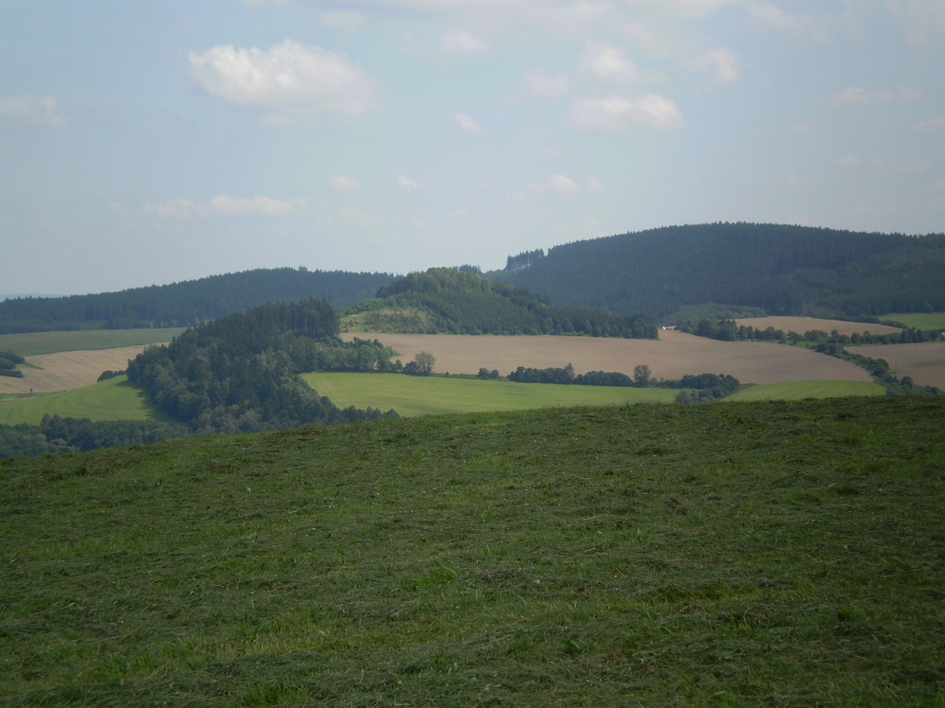 Vrch Louka se zbytky stejnojmenného hradu, Českomoravská vrchovina